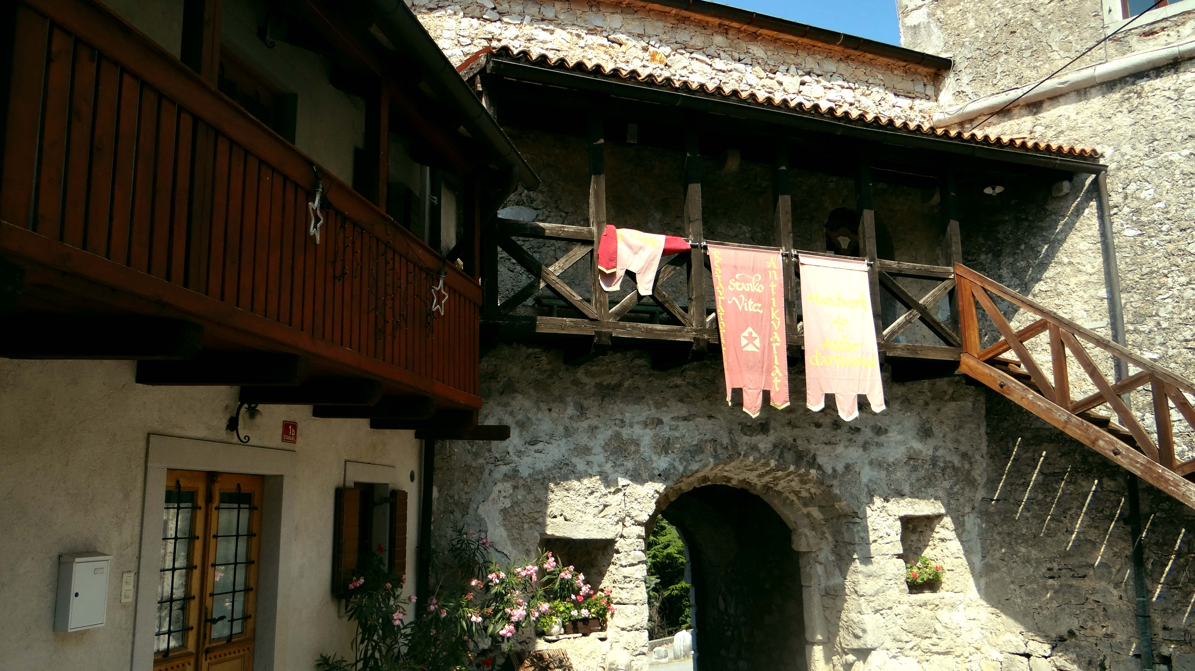 Grad Štanjel VII. 2013